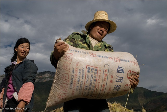 Paysans Mosos durant la récolte de riz